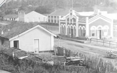 Estacao ferroviaria de Baturite nos anos de 1920